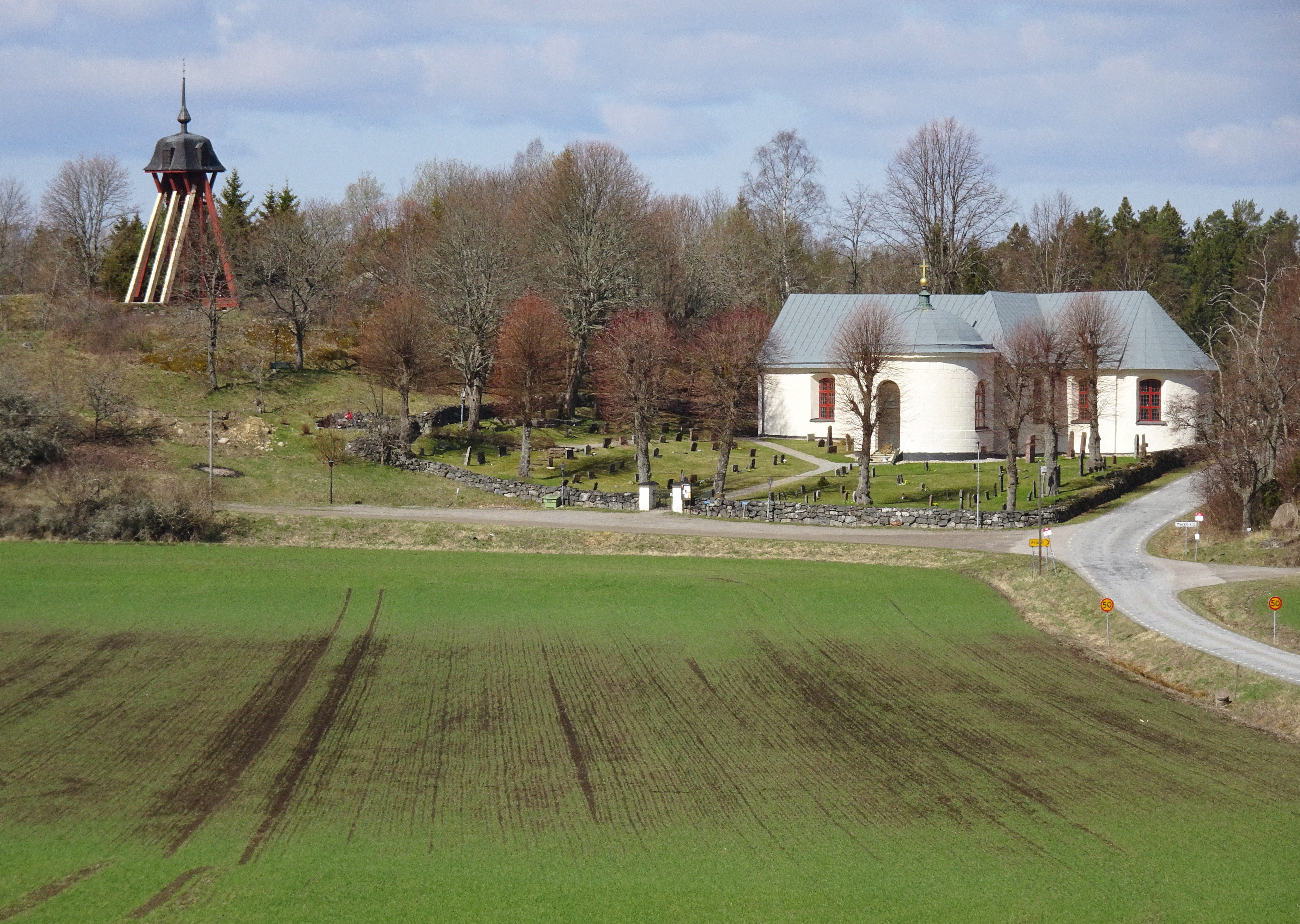 Mörkö kyrka